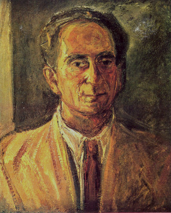 Selbstportrait, entstanden 1939 in Jerusalem.